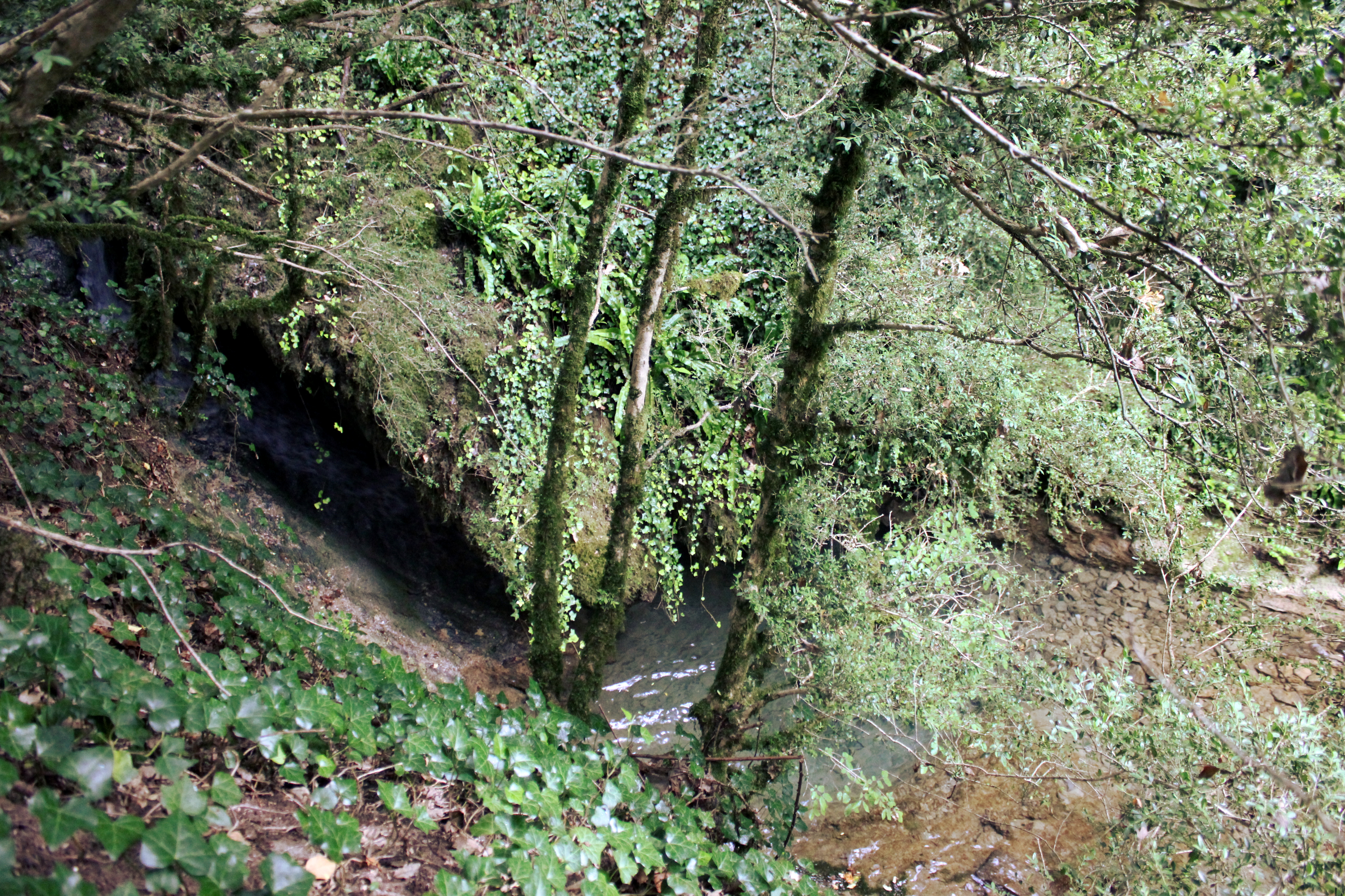 Aragonés: Barranco de Forcos u río Forcos aman d'o parache d'o Puent d'as Crabas, entre Basarán y Escartín